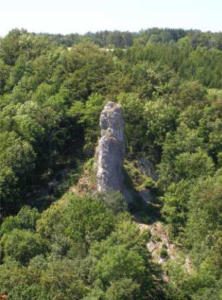 Schauertaler Turm Felsen im Schauertal in Streitberg selbst fotografiert